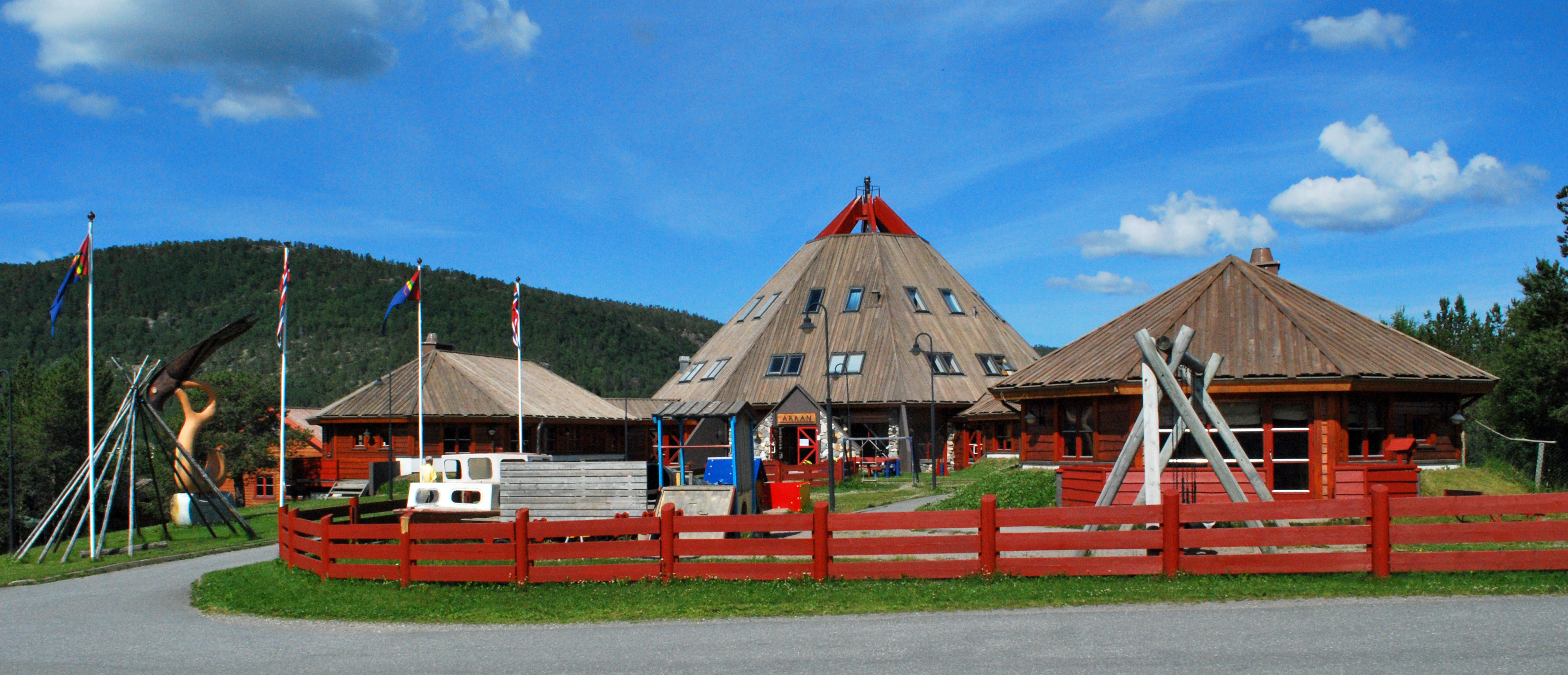 Árran, julevsáme guovdásj/lulesamisk kultursenter, Drag, Tysfjord kommune